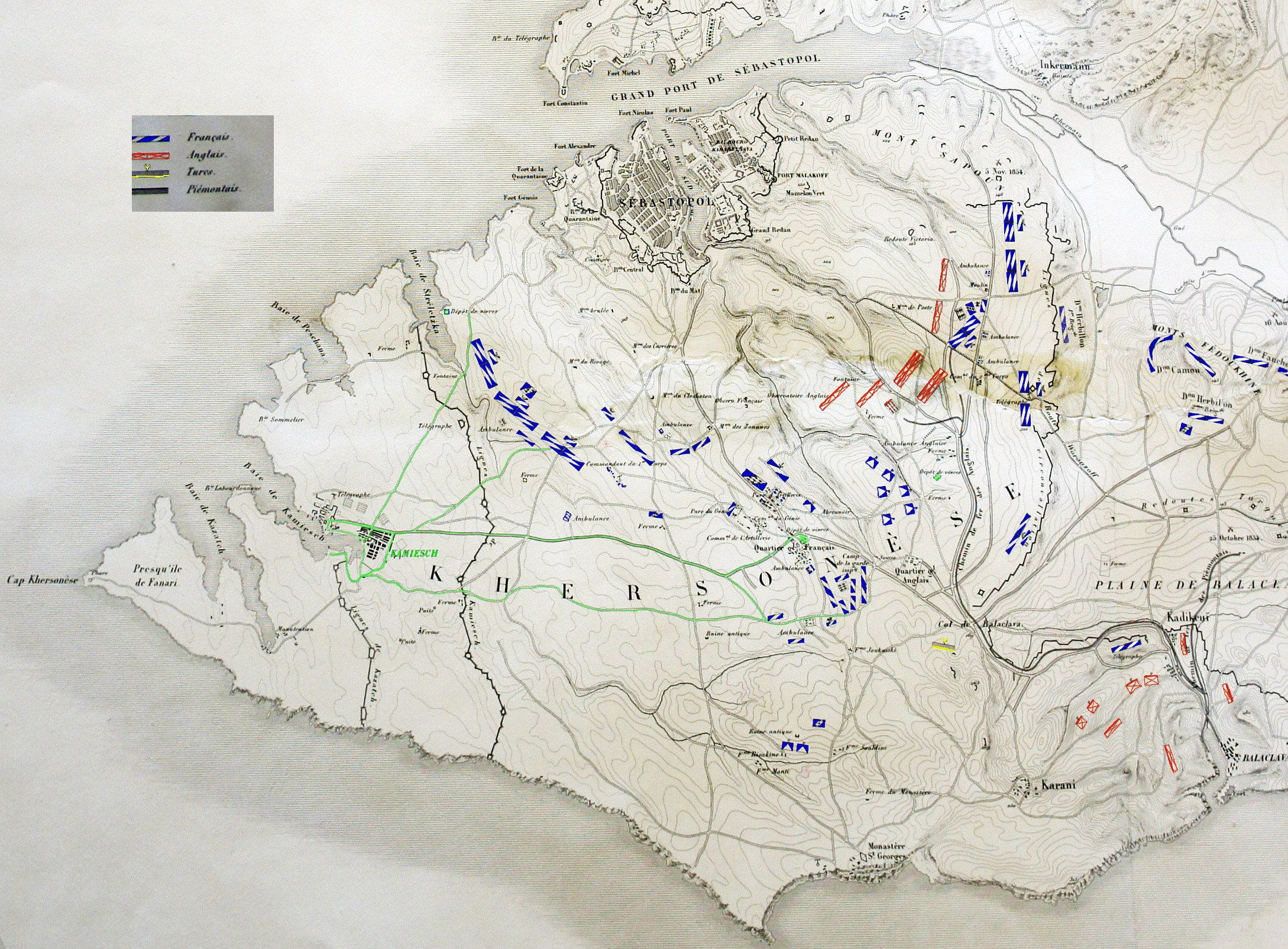 Carte ancienne de Sébastopol avec vue de Kamiech et du ravitaillement français , Elle est issue du travail du général Niel .